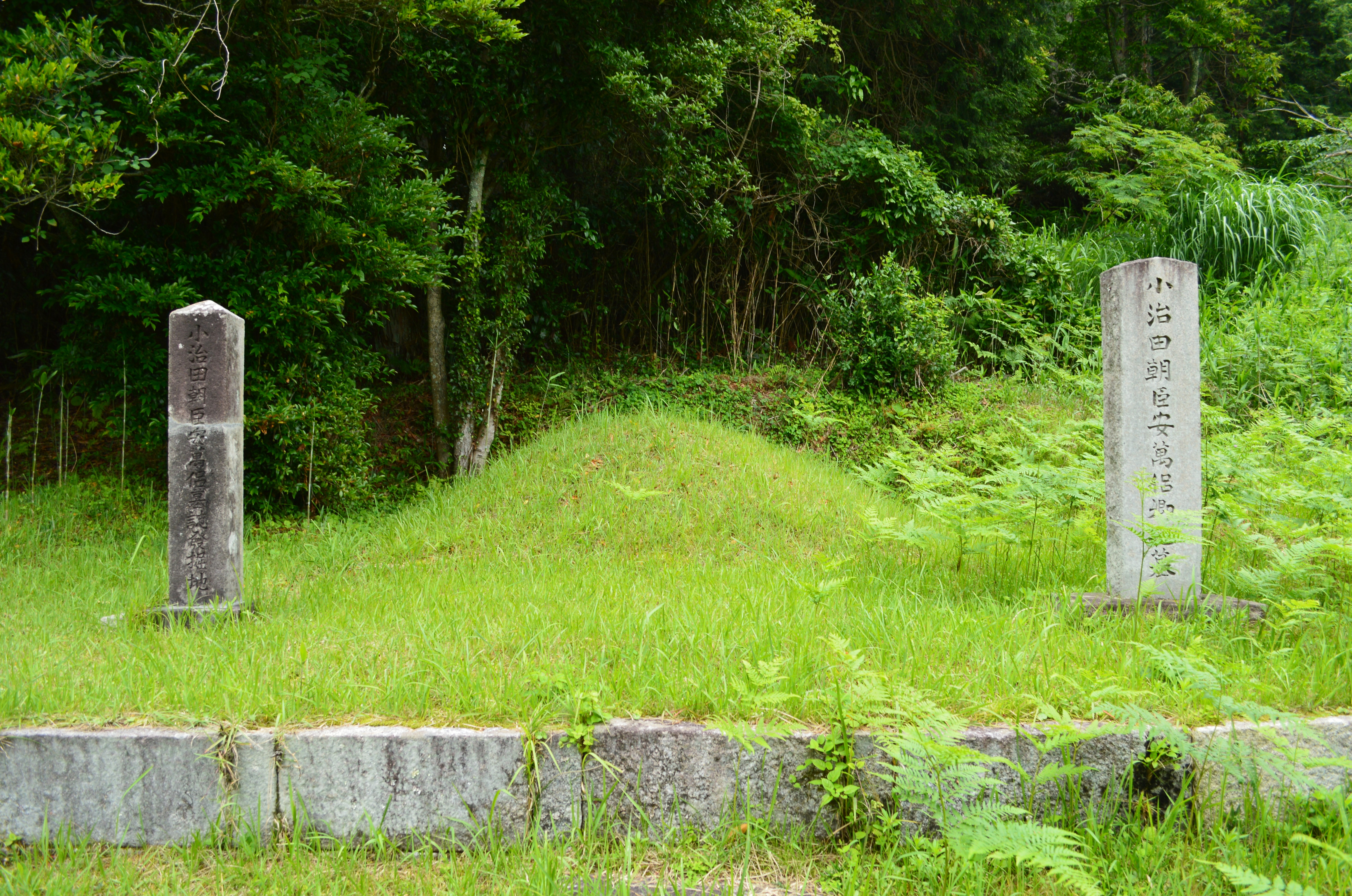 小治田安萬侶墓 墳丘